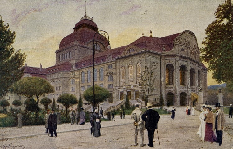 Stadttheater Freiburg i. Br., Ansichtskarte mit geteilter Adressseite, ungelaufen